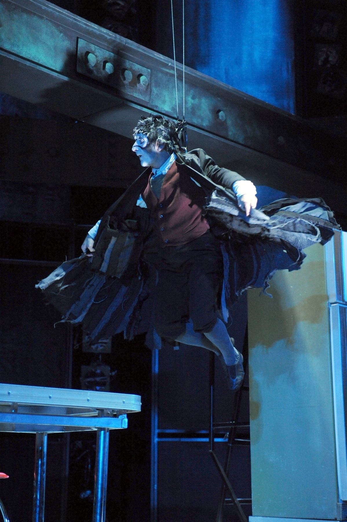 גן הדובדבנים, תיאטרון גשר